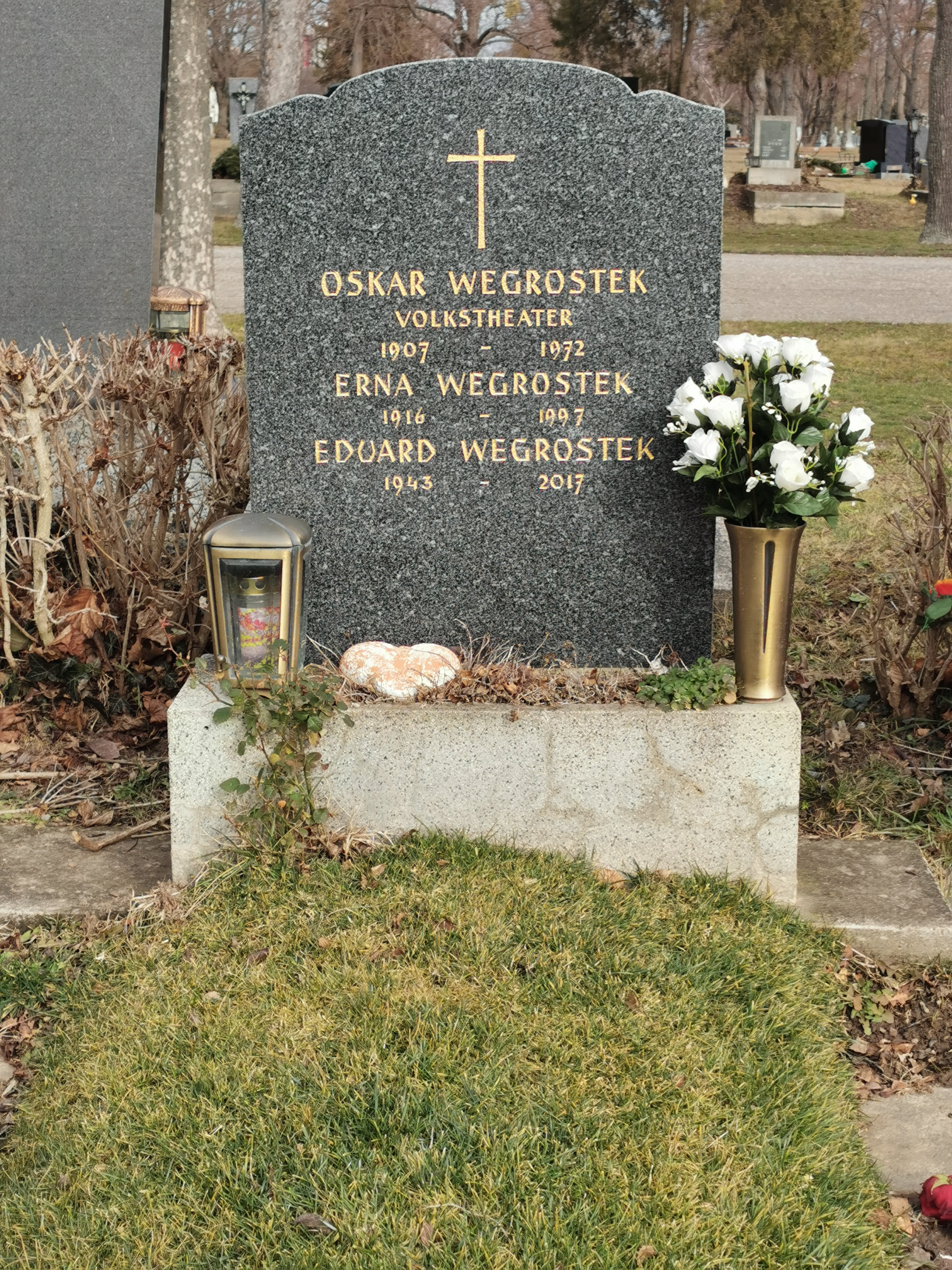 Grab von Oskar Wegrostek auf dem Wiener Zentralfriedhof